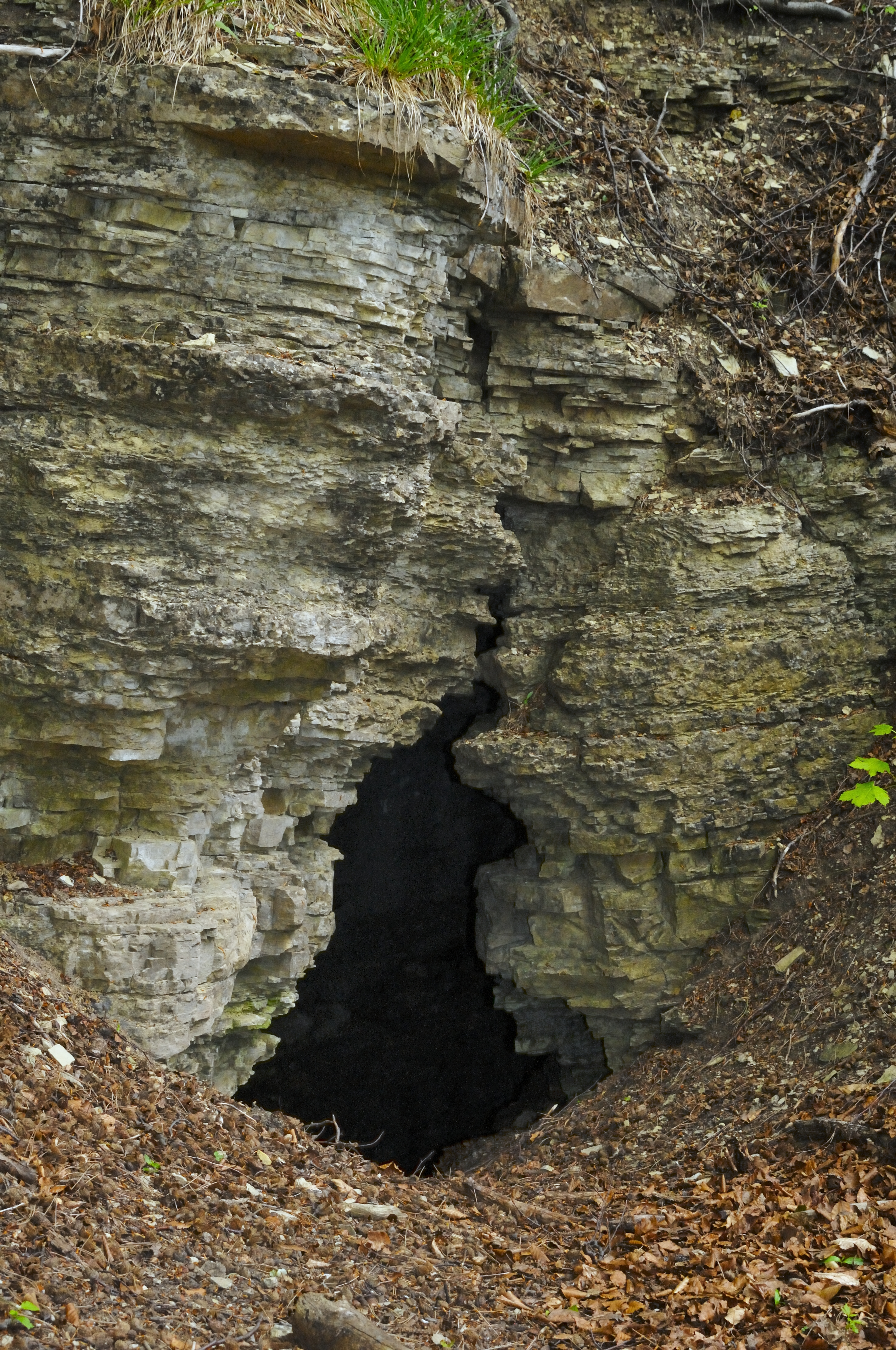 Felsspalte auf der Keudelskuppe, genannt "Taterloch". In diesem Taterloch soll nach einer Sage der "Brombeermann" leben. Eine Wanfrieder Sagengestalt.